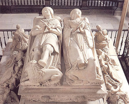 Granada-Capilla Real-8-Sepulcro de Felipe I y de Juana la La Loca (Bartolomé Ordóñez)